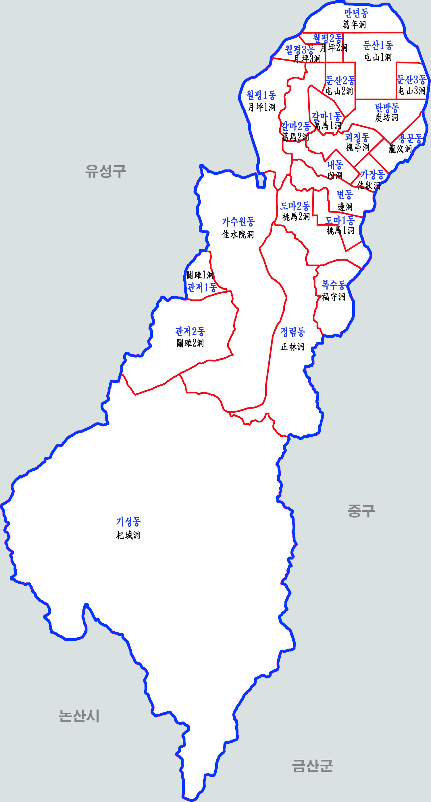 대전시 서구 행정구역